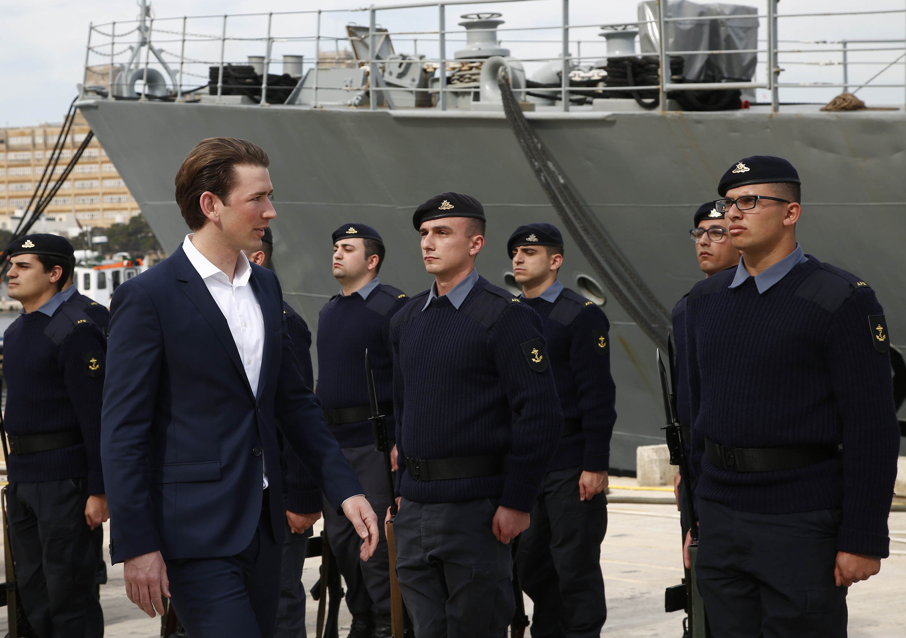 Arbeitsbesuch FRONTEX Malta. Bundesminister Sebastian Kurz besichtigt eine Simulation eines Grenzüberwachungseinsatzes auf einem FRONTEX Schiff. 24.03.2017, Foto: Dragan Tatic